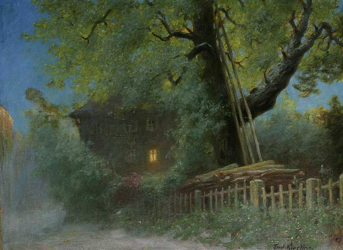 Dämmerung – Forsthaus in Gößweinstein. Öl auf Leinwand, signiert, rückseitig auf altem Klebezettel bezeichnet, 61 x 80.5 cm